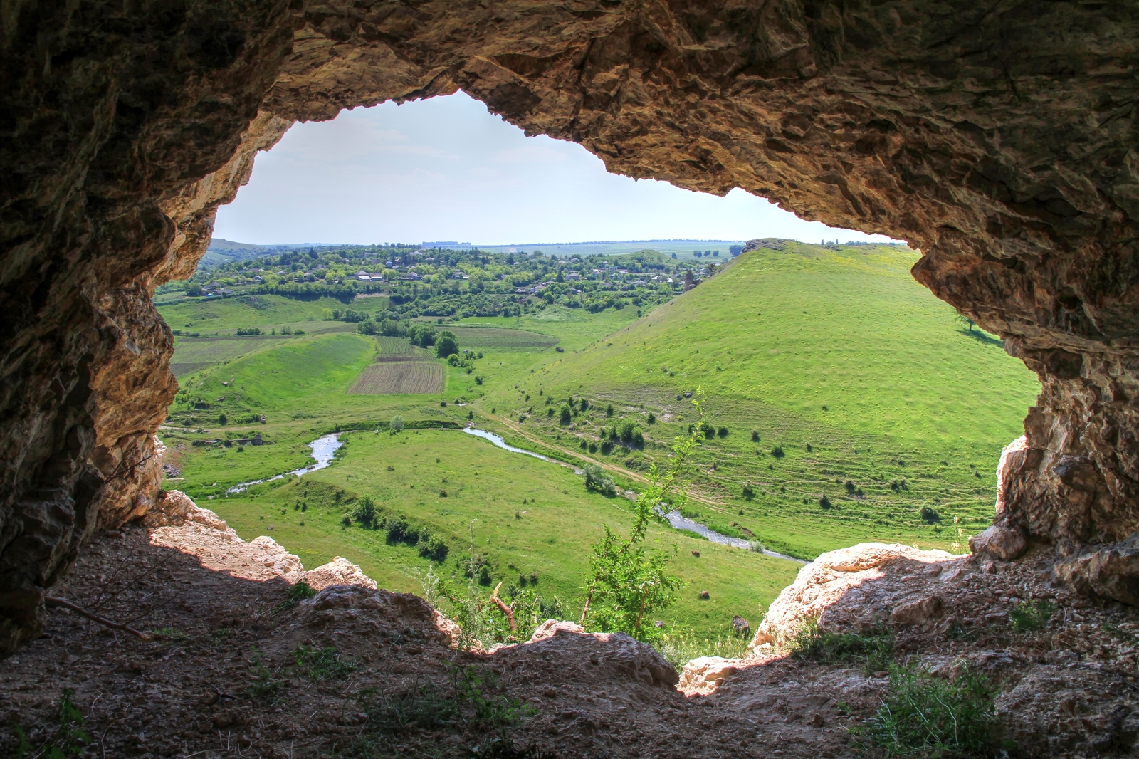 A-031